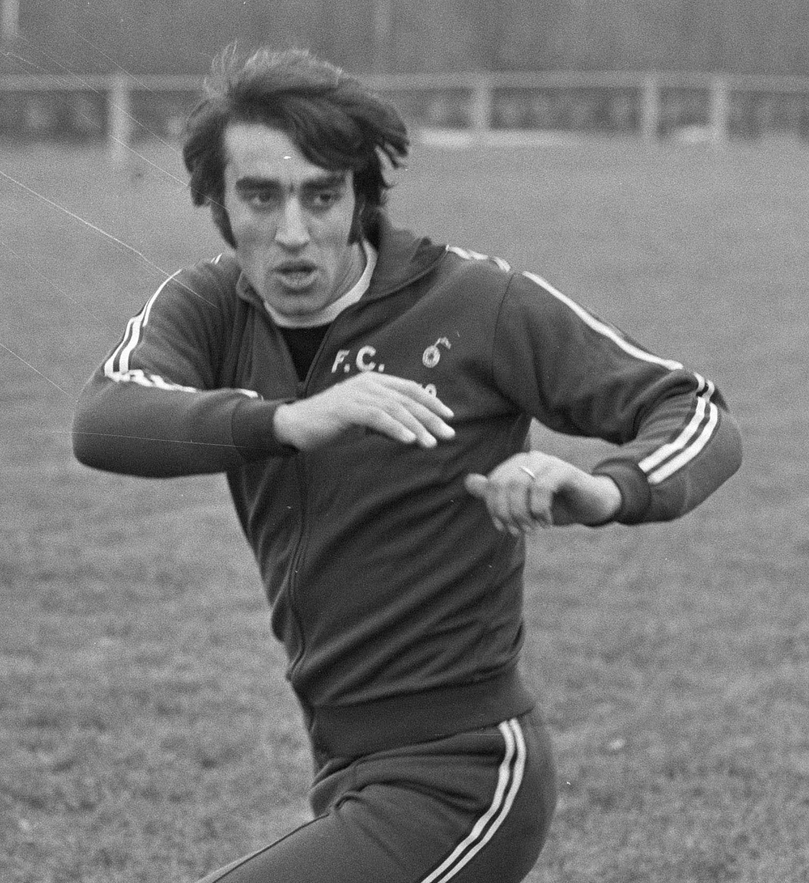 Voetbalclub Juventus (Italie) traint in Enschede; Pietro Anastasi.